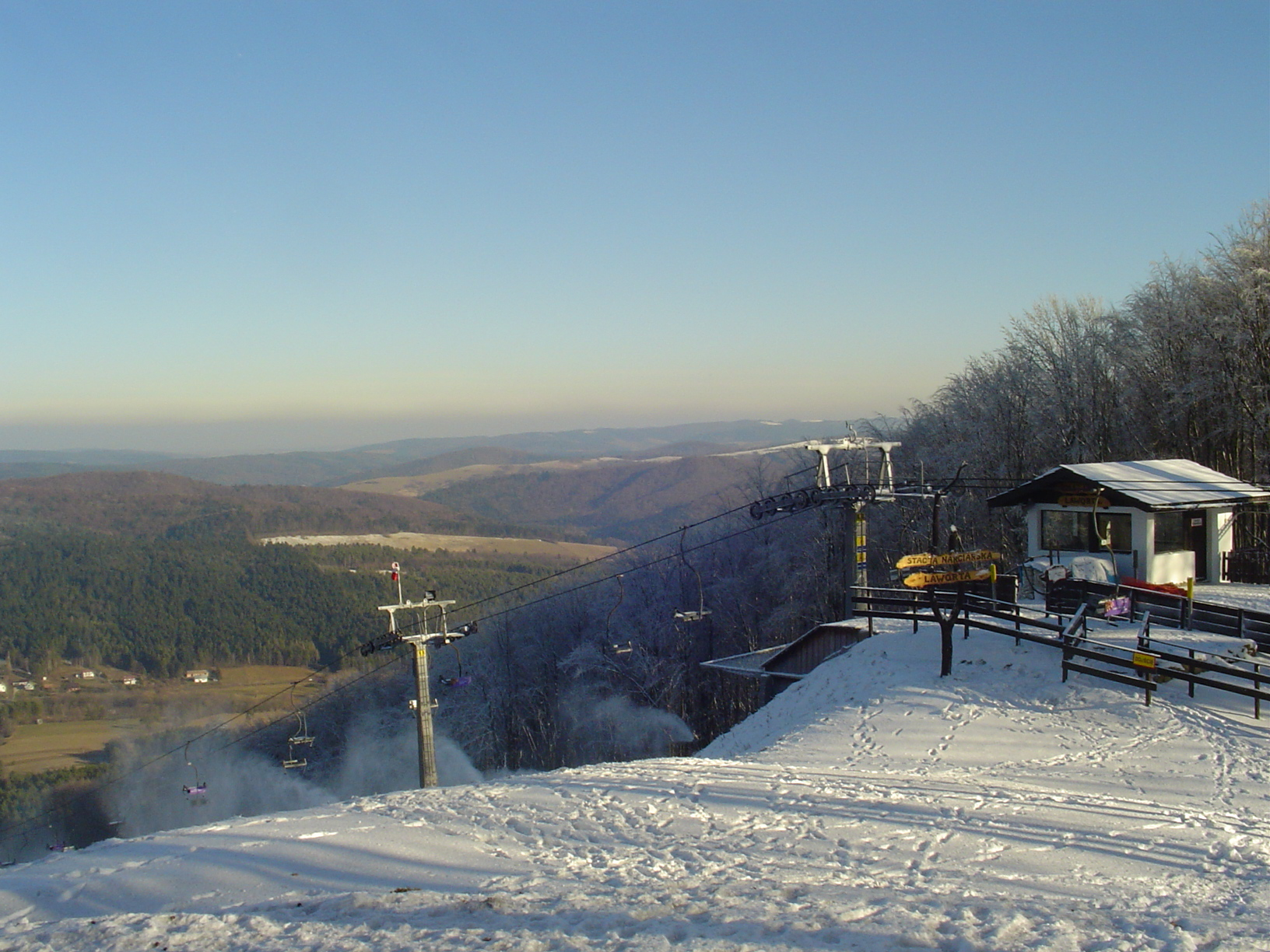 Ustrzyki Dolne, Laworta, Stacja narciarska, zima